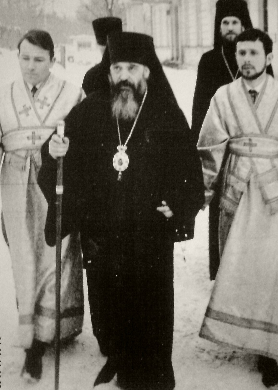 Archimandryta Bazyli (Doroszkiewicz) w drodze do soboru w Warszawie na swoją chirotonię biskupią.